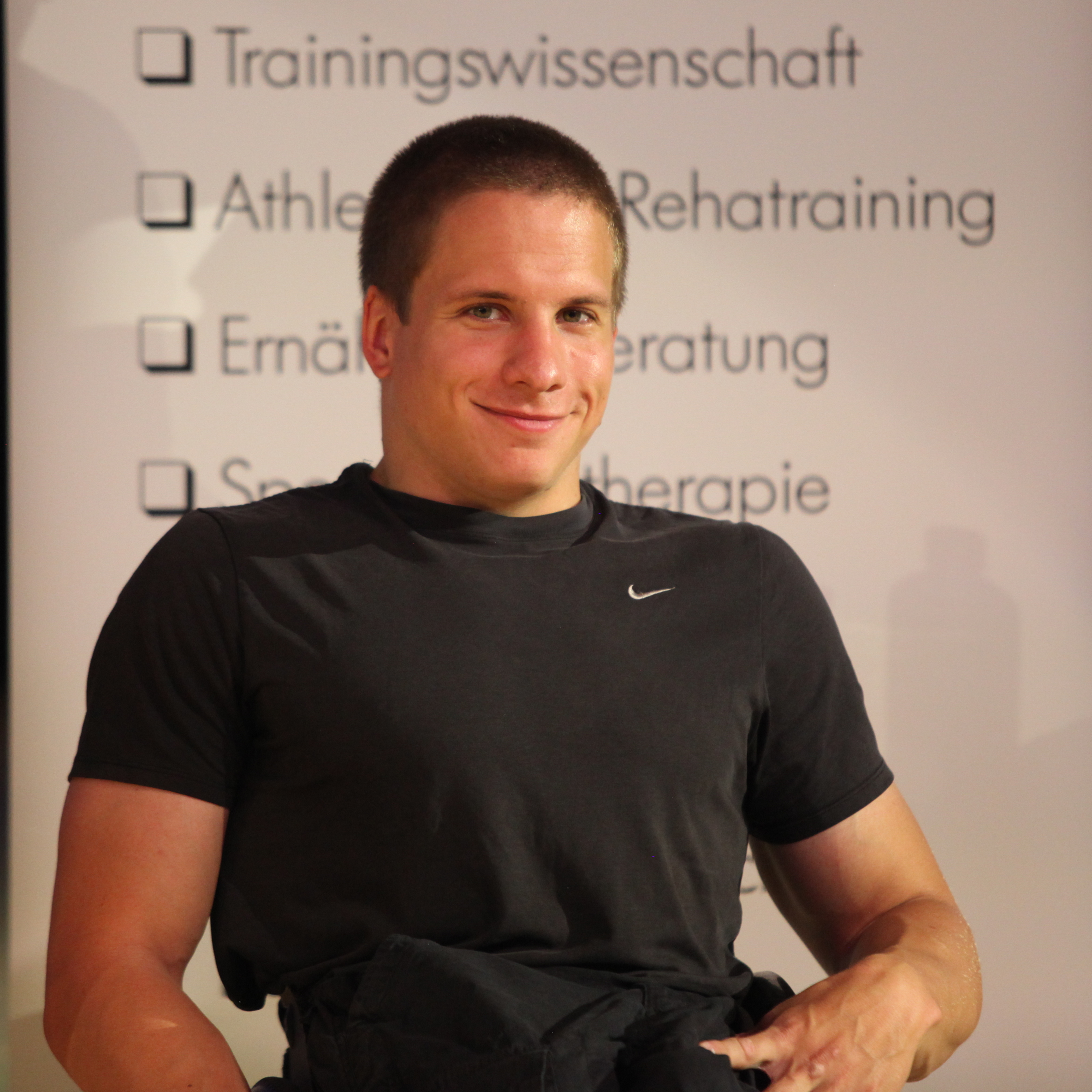 Marc Schuh, deutscher Rollstuhlleichtathlet, bei der Podiumsdiskussion Sport im Dialog: Hoch hinaus - Spitzensport zwischen Rhein, Main und Neckar des Handballleistungszentrums Bergstraße beim Hessentag 2014 in Bensheim.